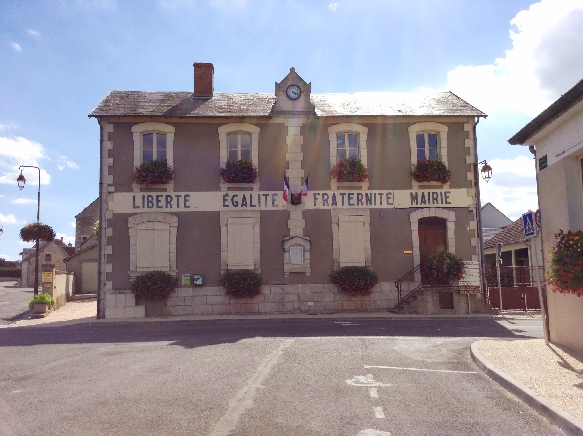 Mairie de Venesmes, Cher